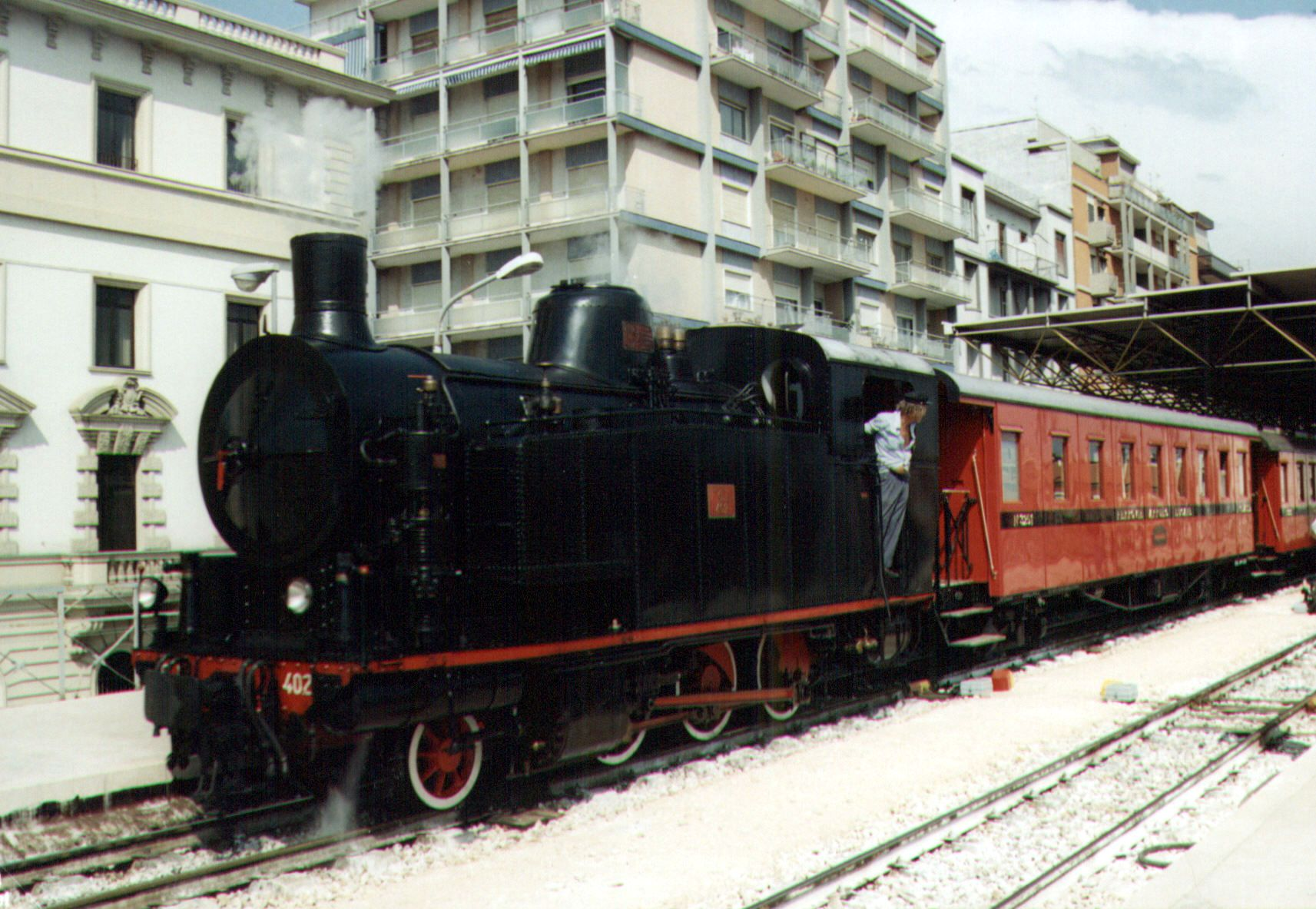 Locomotiva a vapore 402 delle Ferrovie Calabro-Lucane in partenza da Bari con un treno rievocativo